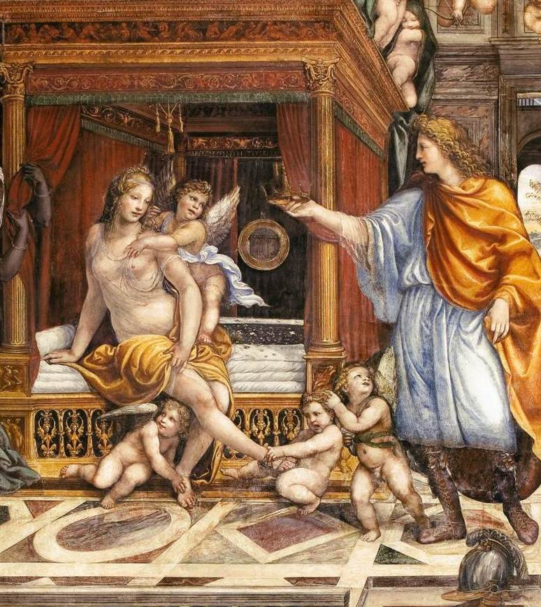 detail